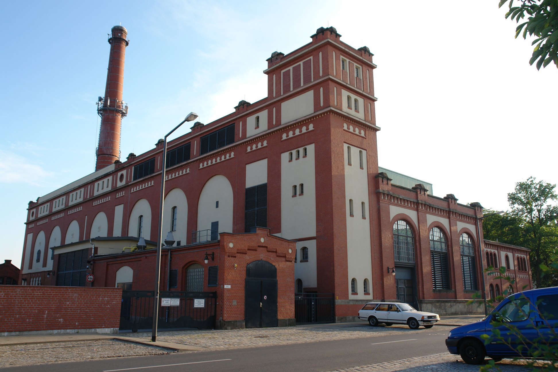 Dresden: Das Heizkraftwerk Nord im Industriegelände